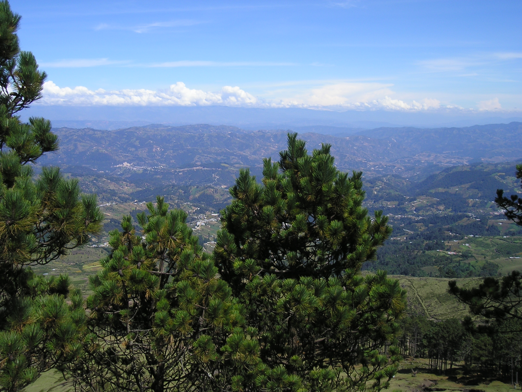 Pinus hartwegii. Note dark purple cones. Volcán Tajumulco, Guatemala.